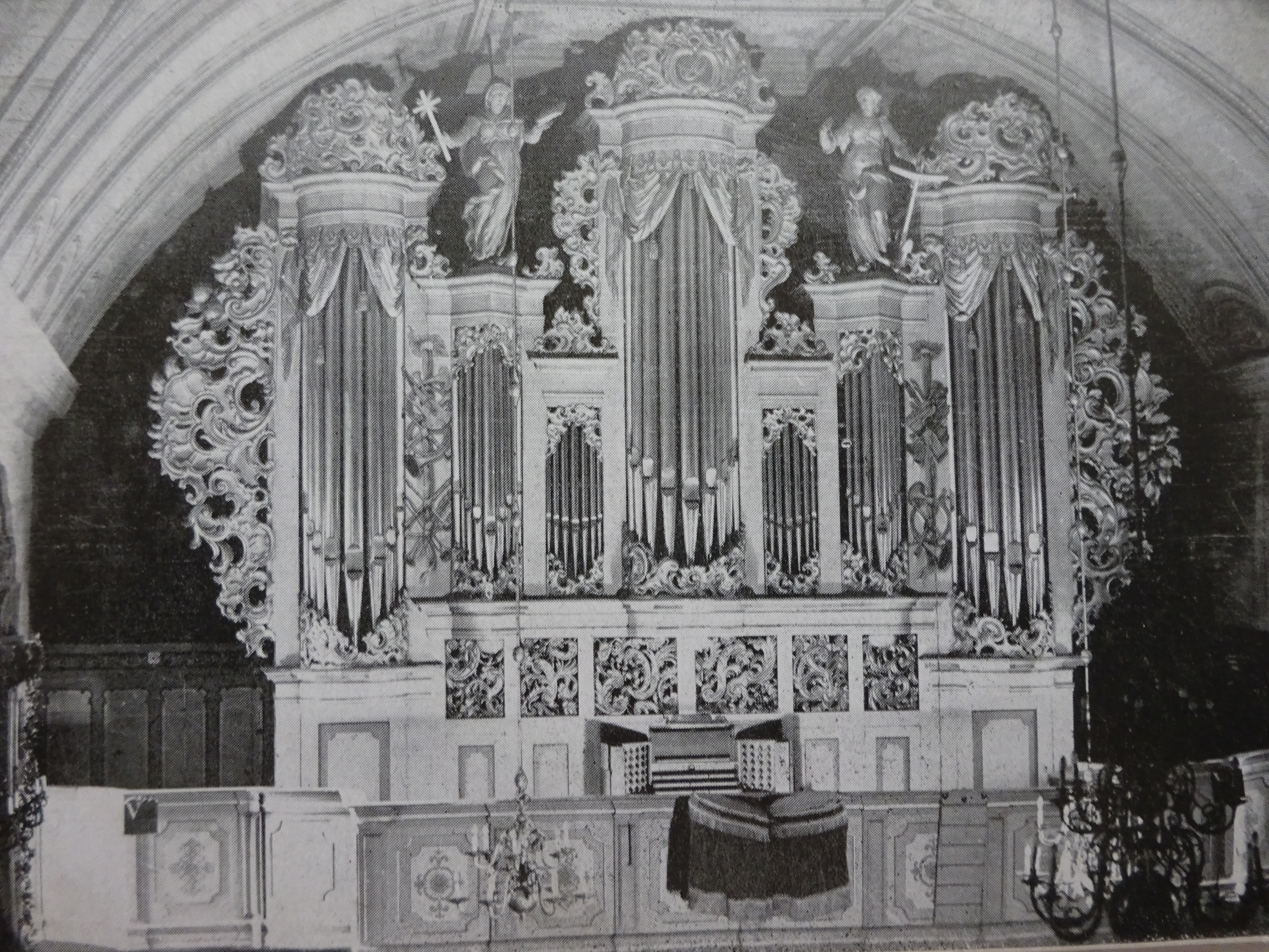 ehemalige Orgel des Meisters Johann Adam Berner in der Stadtkirche zu Jever, erbaut 1756-1759, zerstört 1959 beim Brand der Kirche